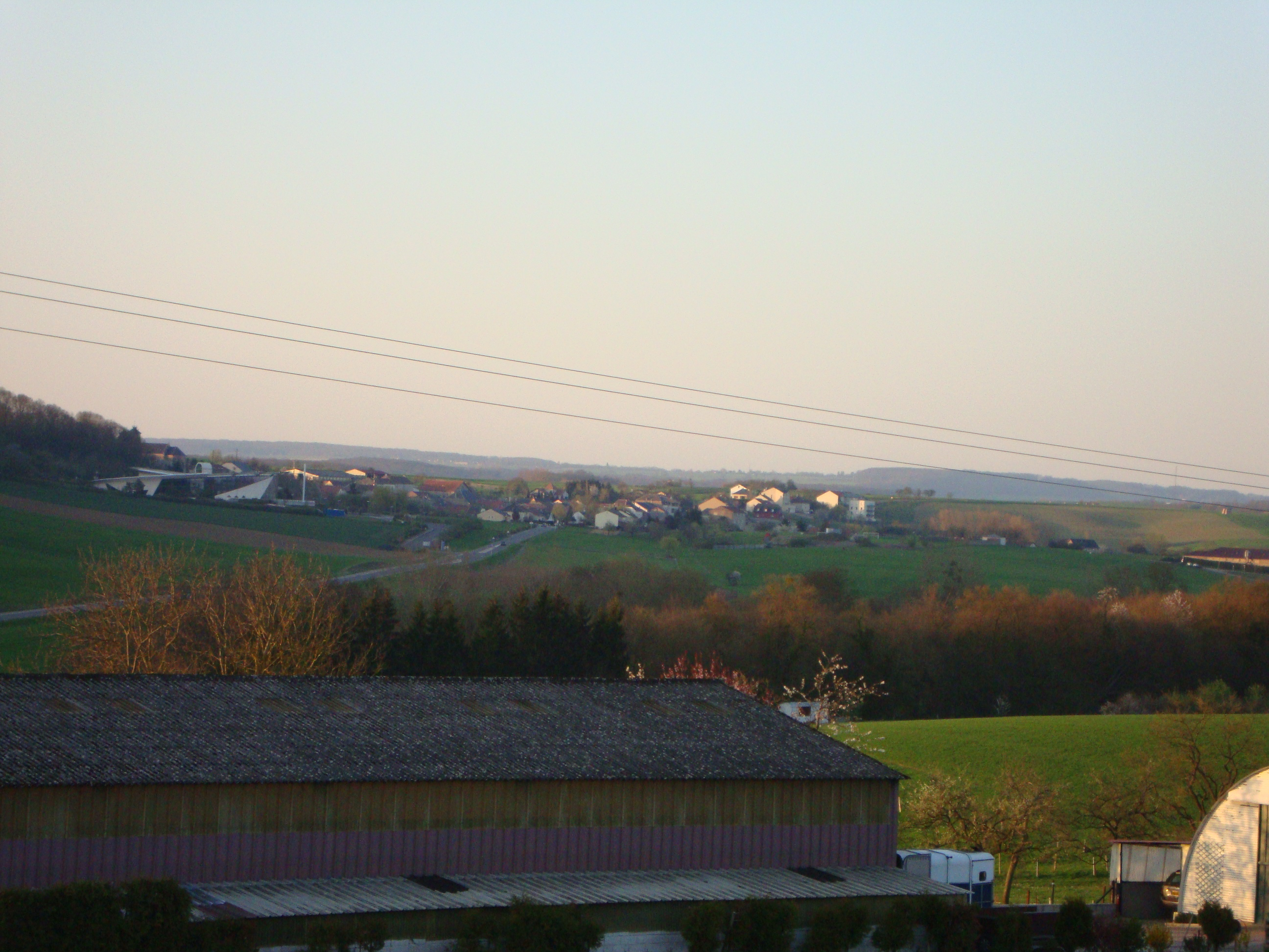 Breisroff-la-Grande